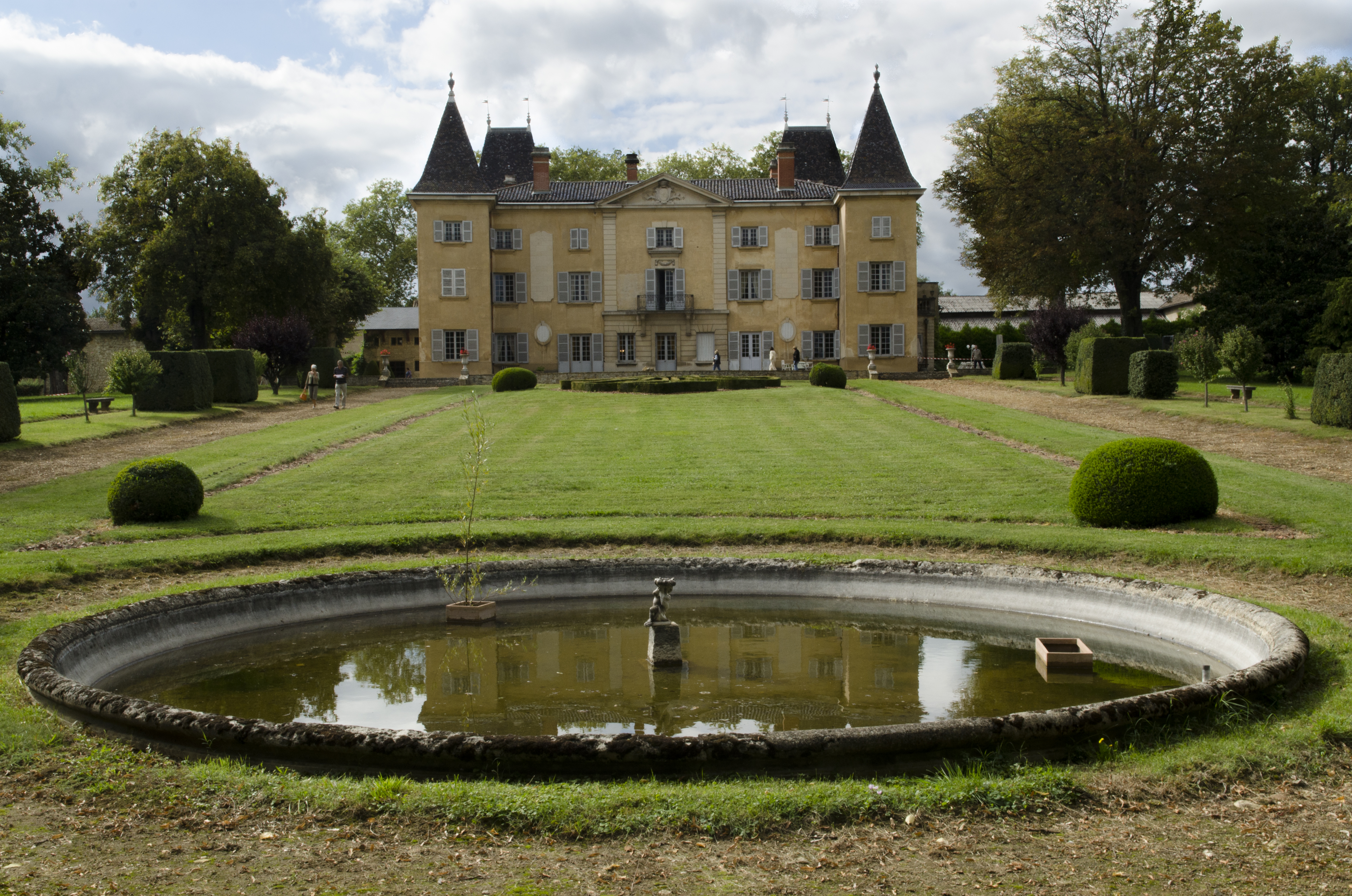 Château de Vaurenard, Rhône, France Château et fontaine .